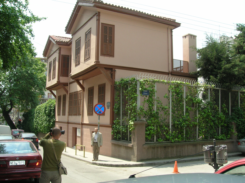 Atatürk'ün doğduğu ev